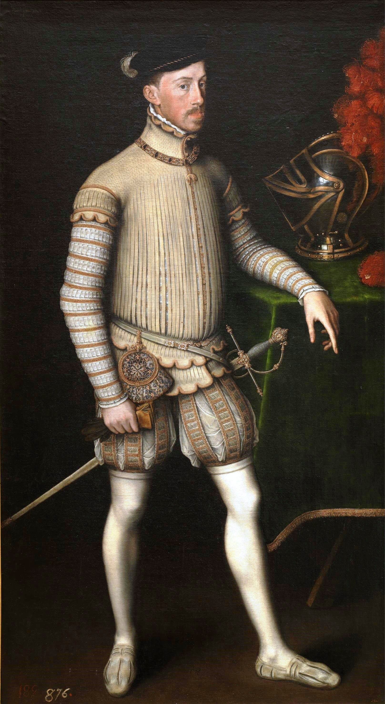 Retrato del emperador Maximiliano II de Habsburgo (1503-1564), que fue hijo del emperador Fernando I de Habsburgo y de la emperatriz Ana Jagellón de Hungría y Bohemia.